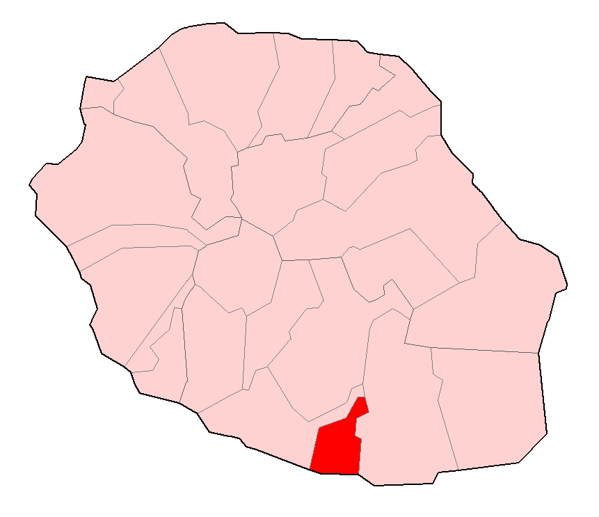 Carte de La Réunion permettant de localiser Petite-Île.